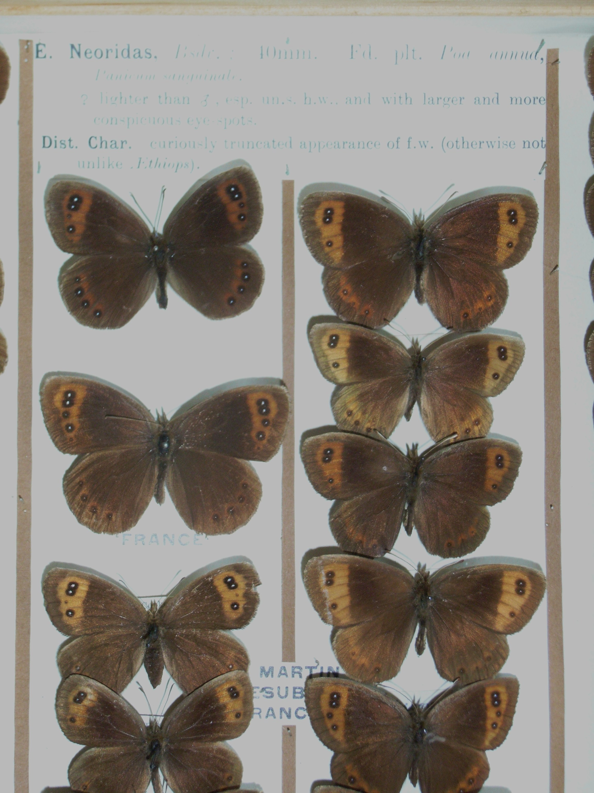 Erebia neoridas